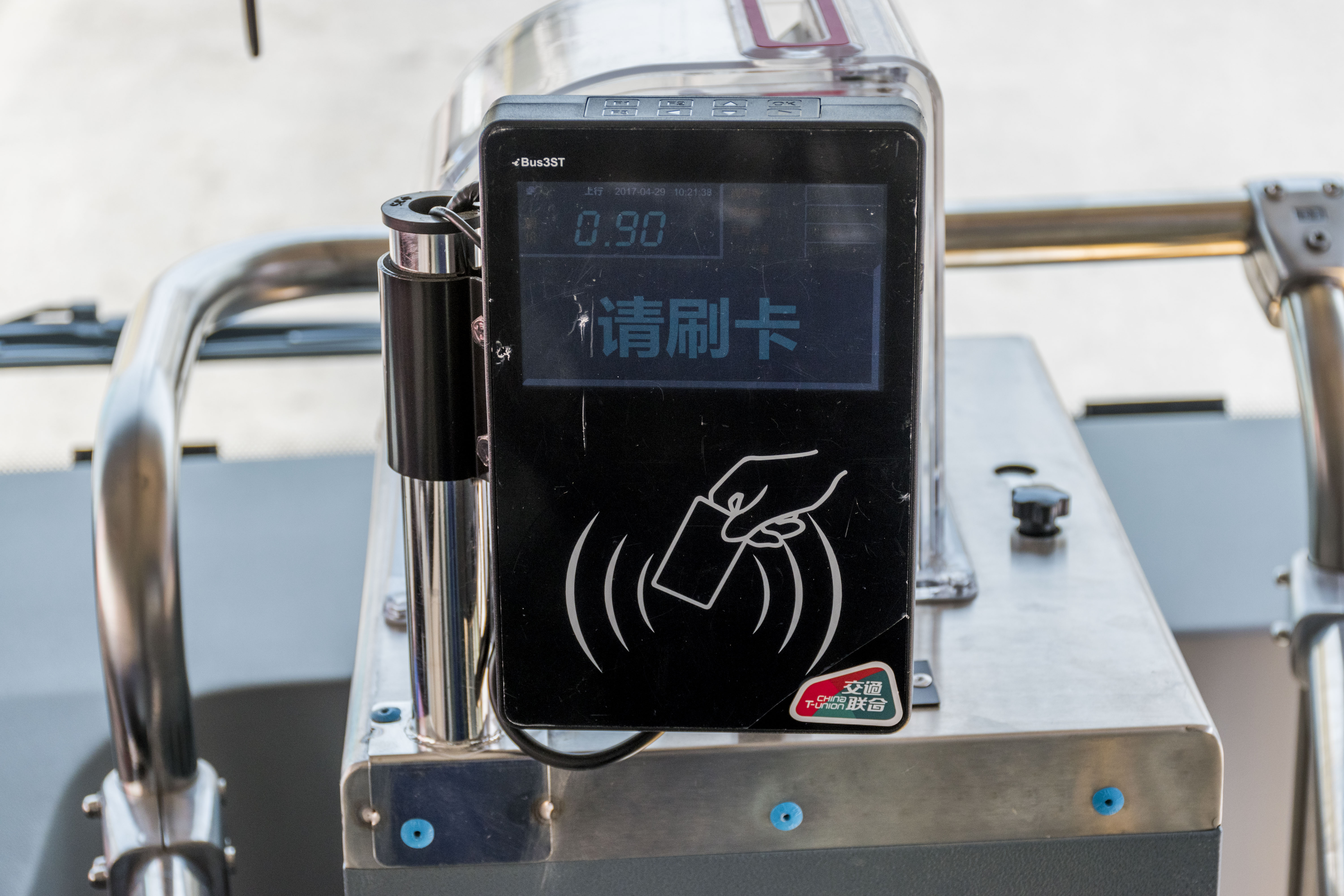 大连公交上，一台已升级可使用ʽ全国交通一卡通互联互通ʼ的收费器